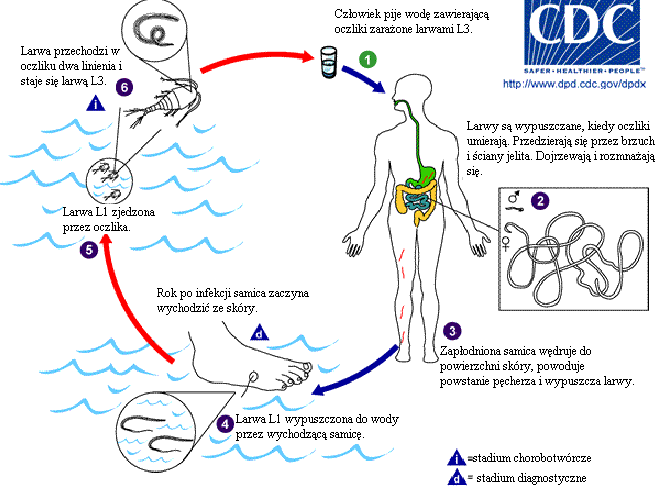 Cykl życiowy riszty